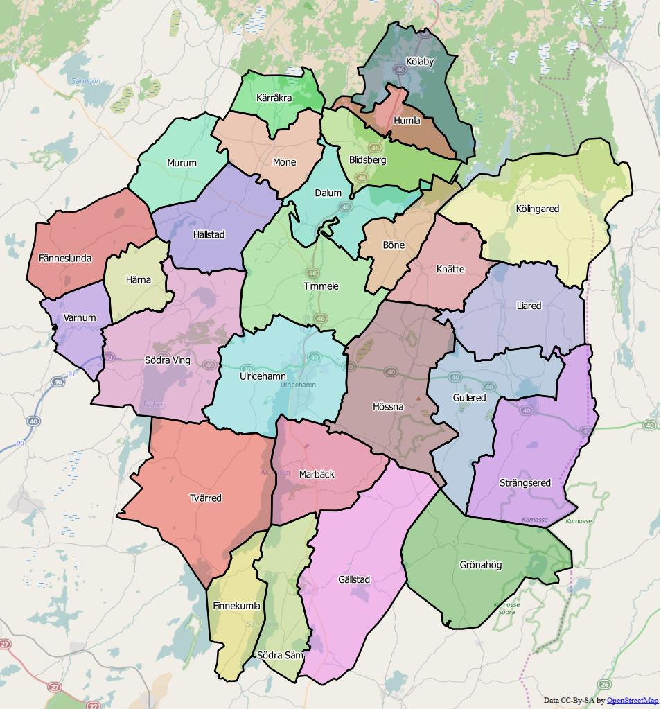 Distriktsindelningen i Ulricehamns kommun World file: 87.36365731059593998 0 0 -87.36365731059593998 1455591.56781596574001014 7972282.06051402539014816